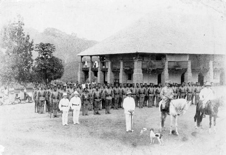 Ebolowa 5. Kompagnie Sergt. Matzke, Sergt. Perßon Leutn. Henner, Hauptm. Heinicke